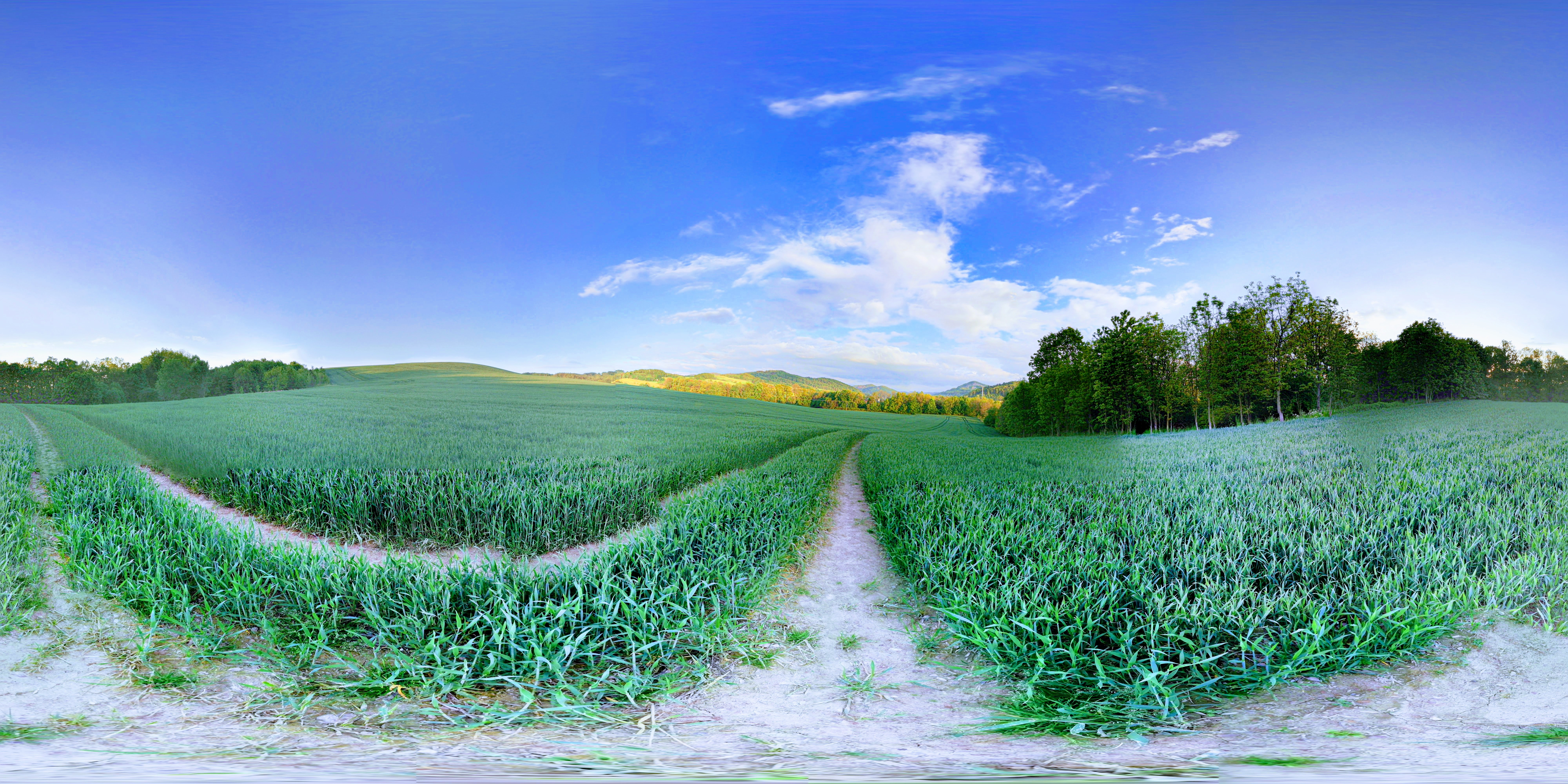 Panorama 360 WOJCIESZÓW 20.05.2019